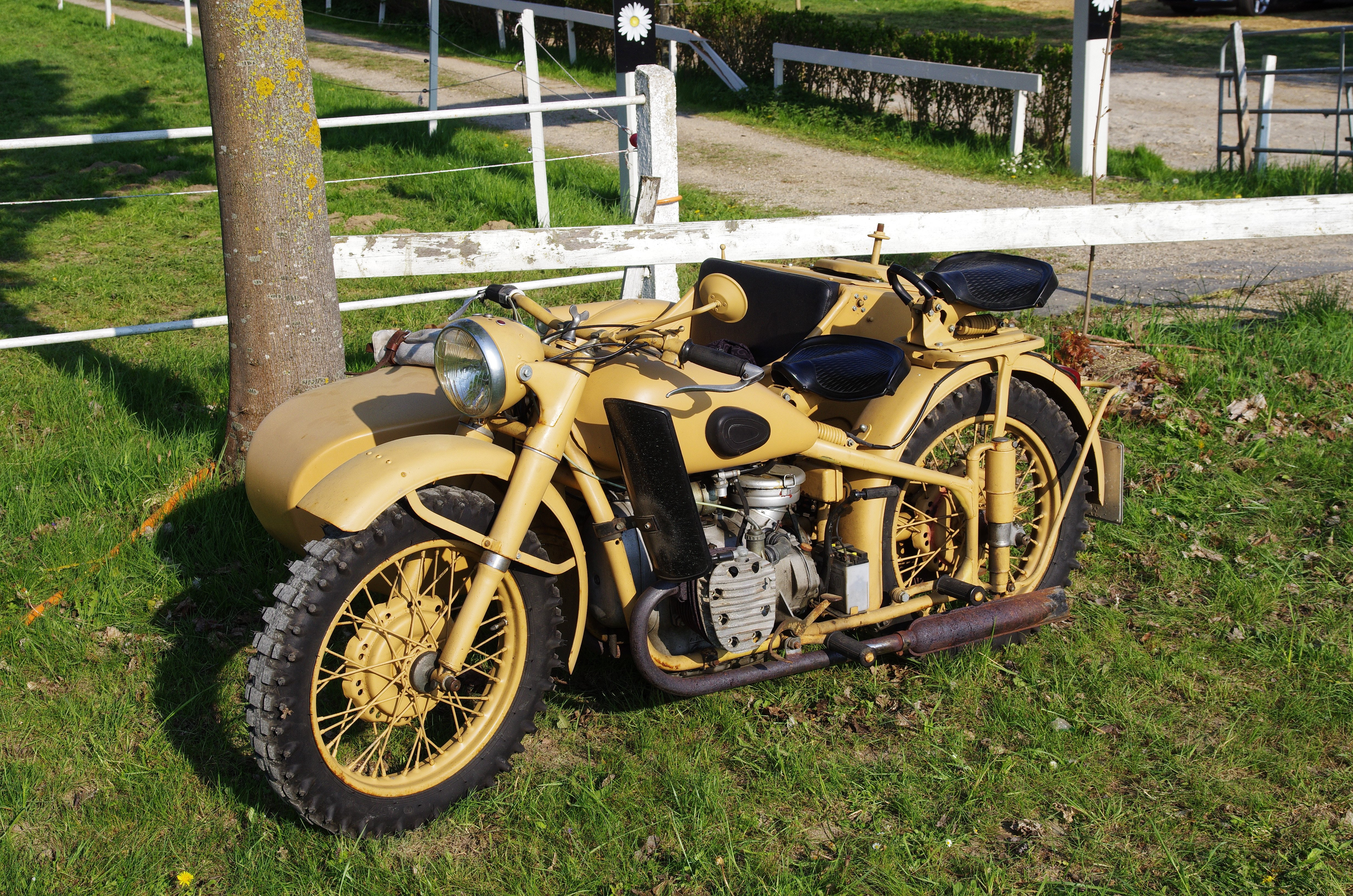 Dnepr/Ural M-72 Basis ist die BMW R 71.